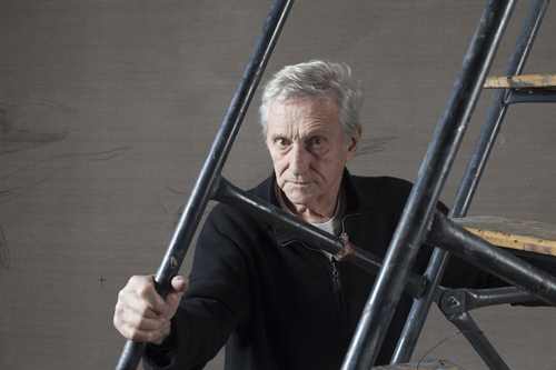 portrait de Vladimir Velickovic dans son atelier © Zarko Vijatovic